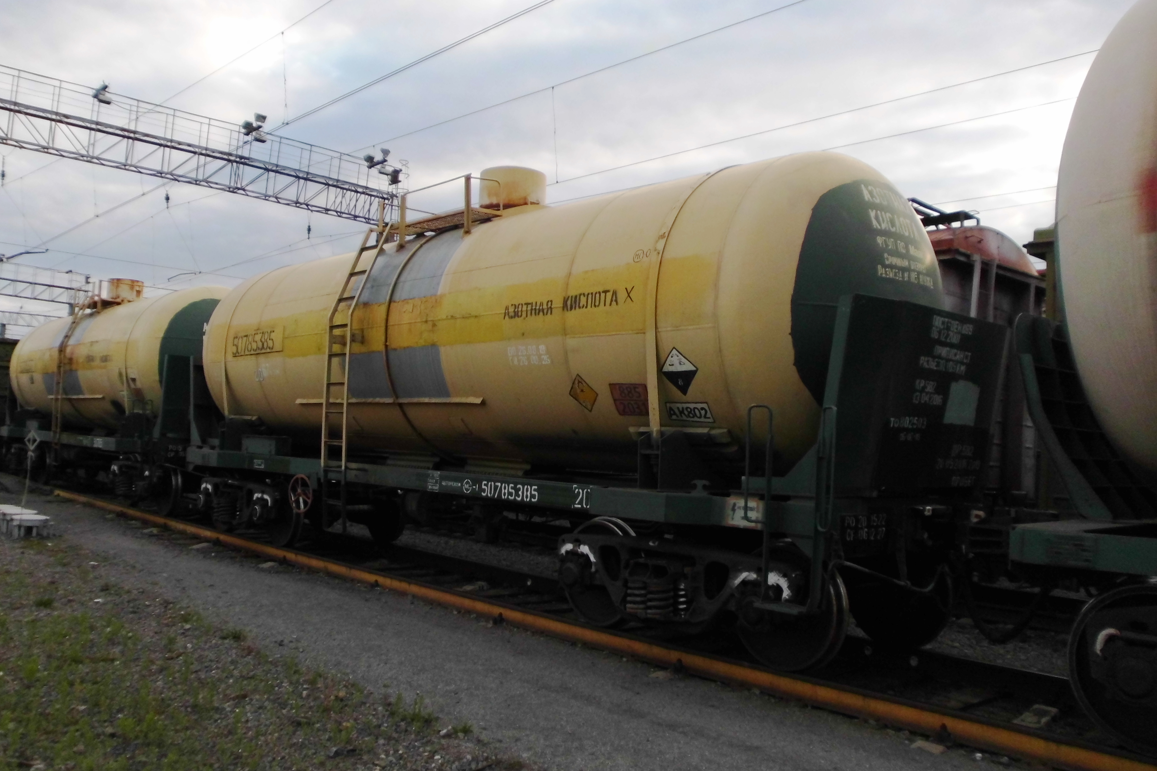 4-х осный вагон-цистерна для азотной кислоты с бронелистом. Россия.